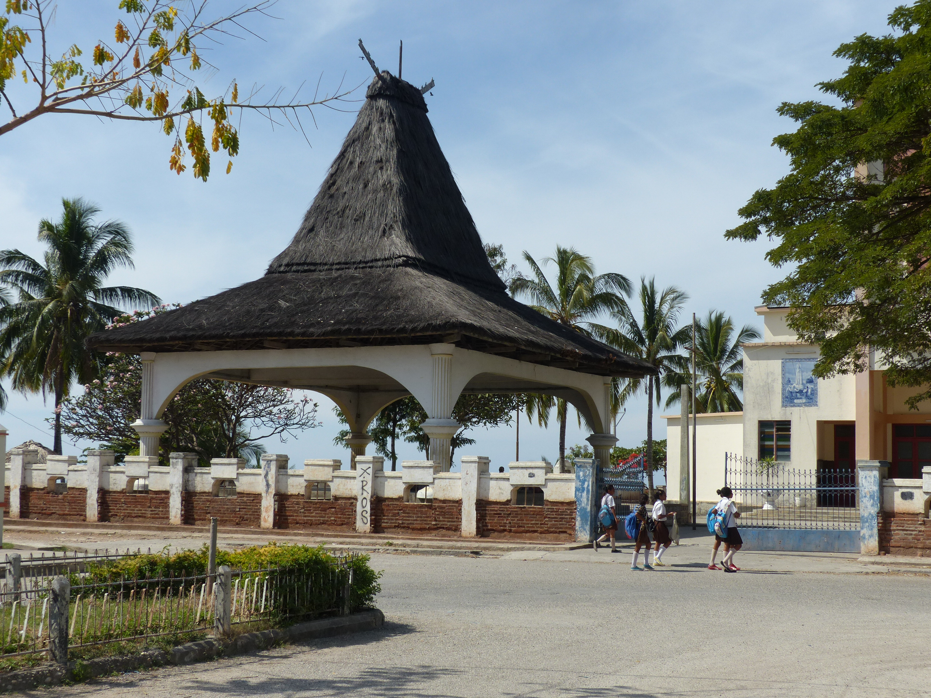 Vorplatz der Kahedrale von Baucau. Das Gebäude entspricht einem traditionellen, timoresischen Versammlungsort.